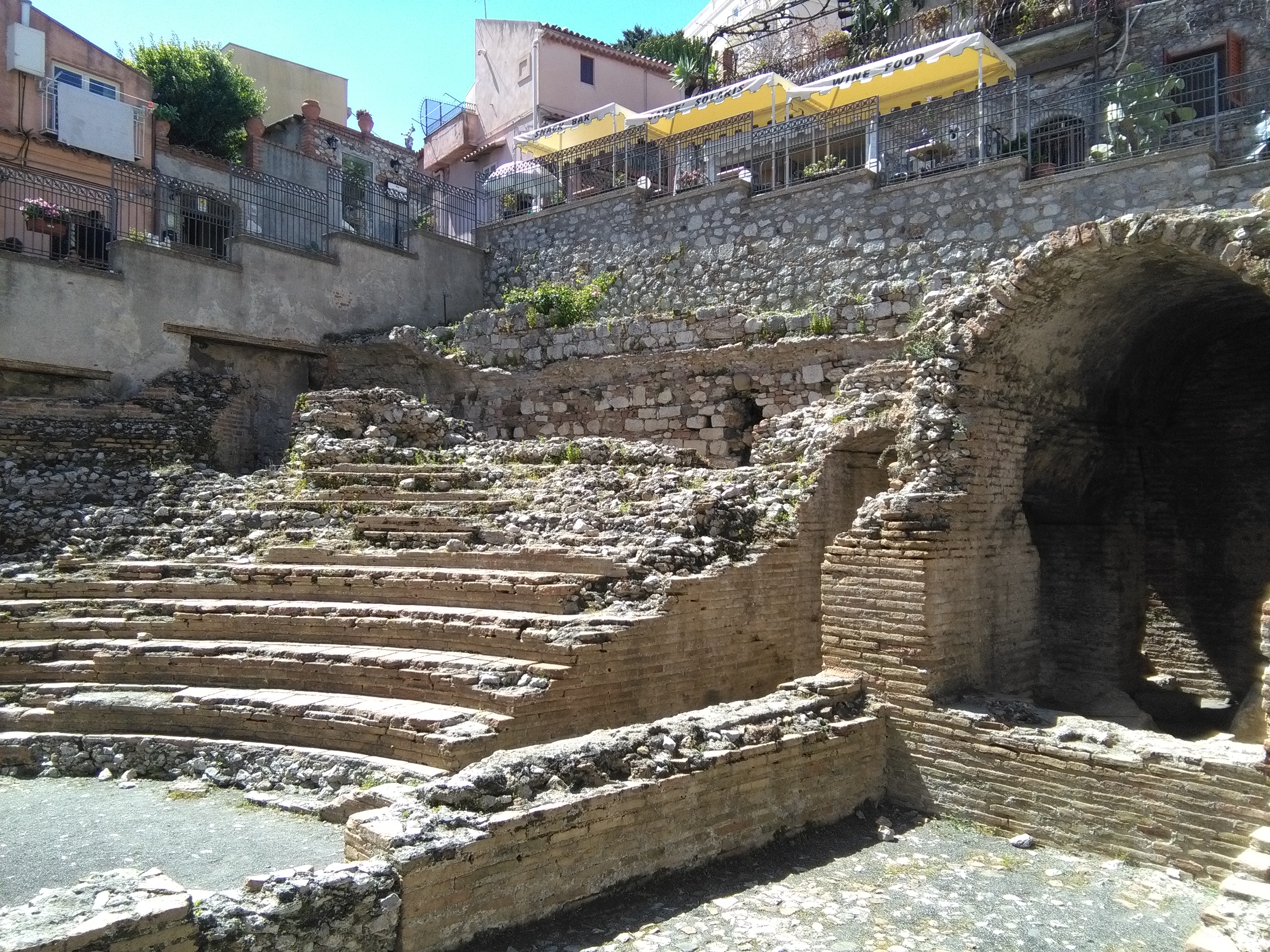 Roman Odeon in Taormina dating to 21 BC